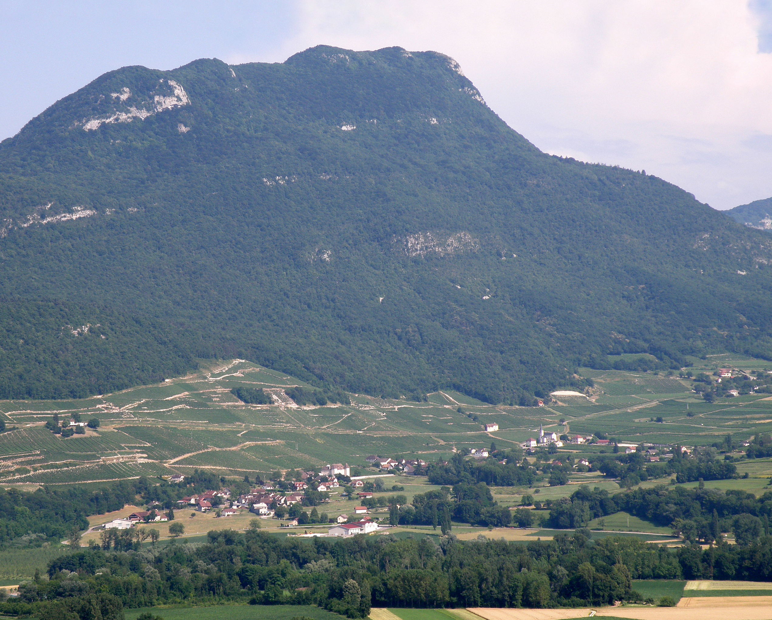 Jongieux, comm. dans le département de la Savoie (région Rhônes-Alpes, France). Vue générale depuis Massignieu-de-Rives.